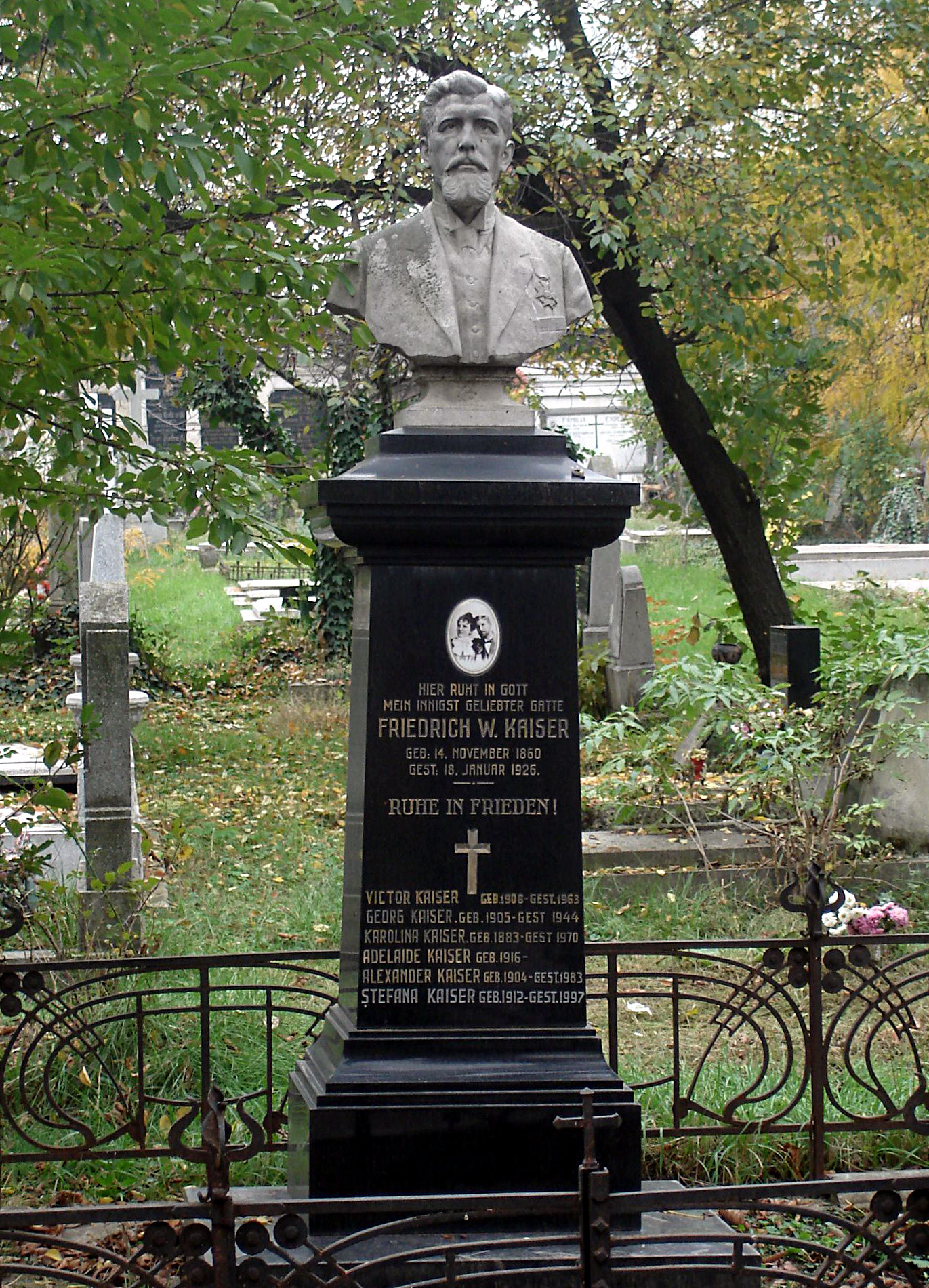 Monumentul funerar Dr. Kaiser, Cimitirul Evanghelic Bucuresti